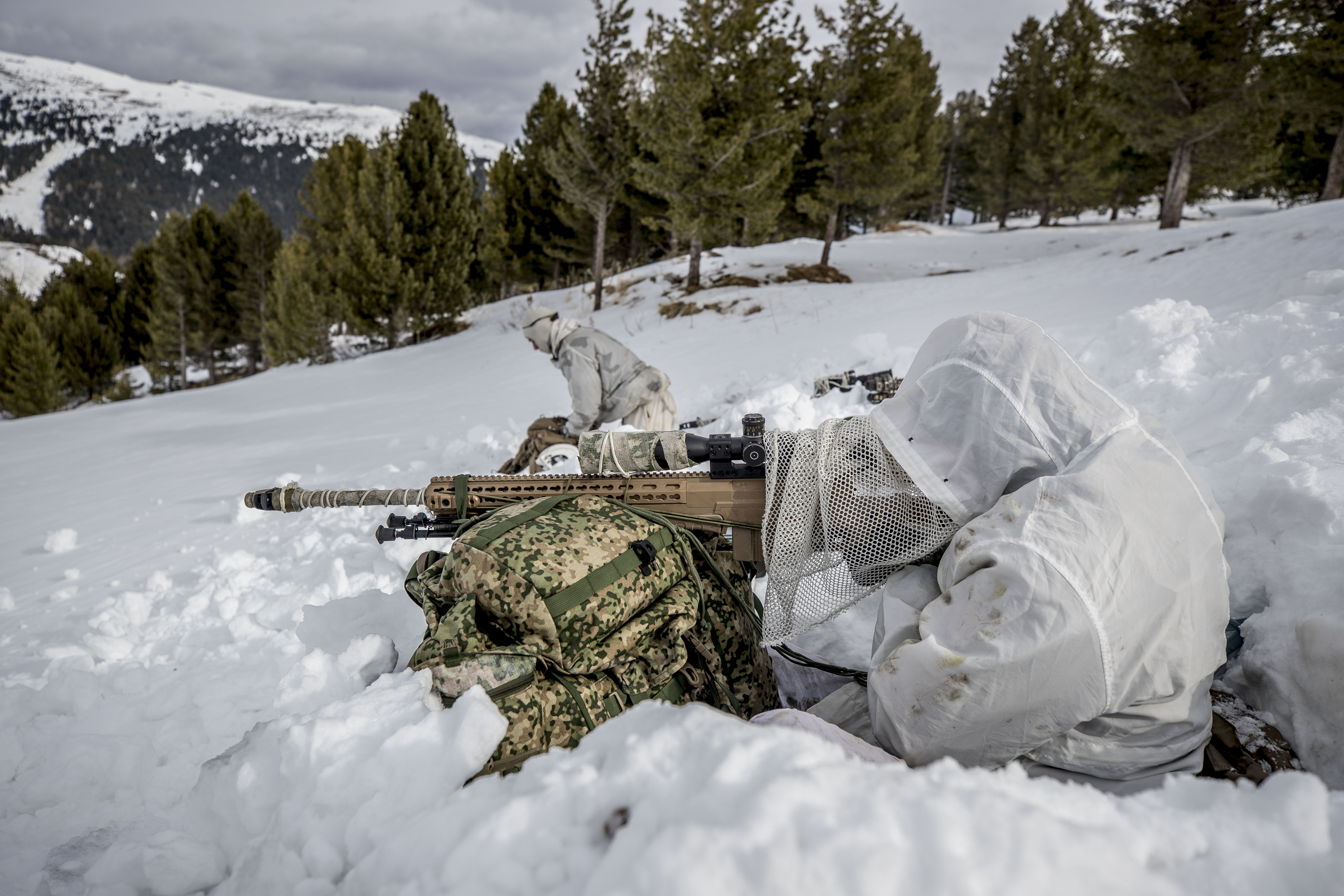 Judenburg, Oostenrijk 20 Februari 2019 High Angle shoot training Scherpschutter oefenen in berg gebied